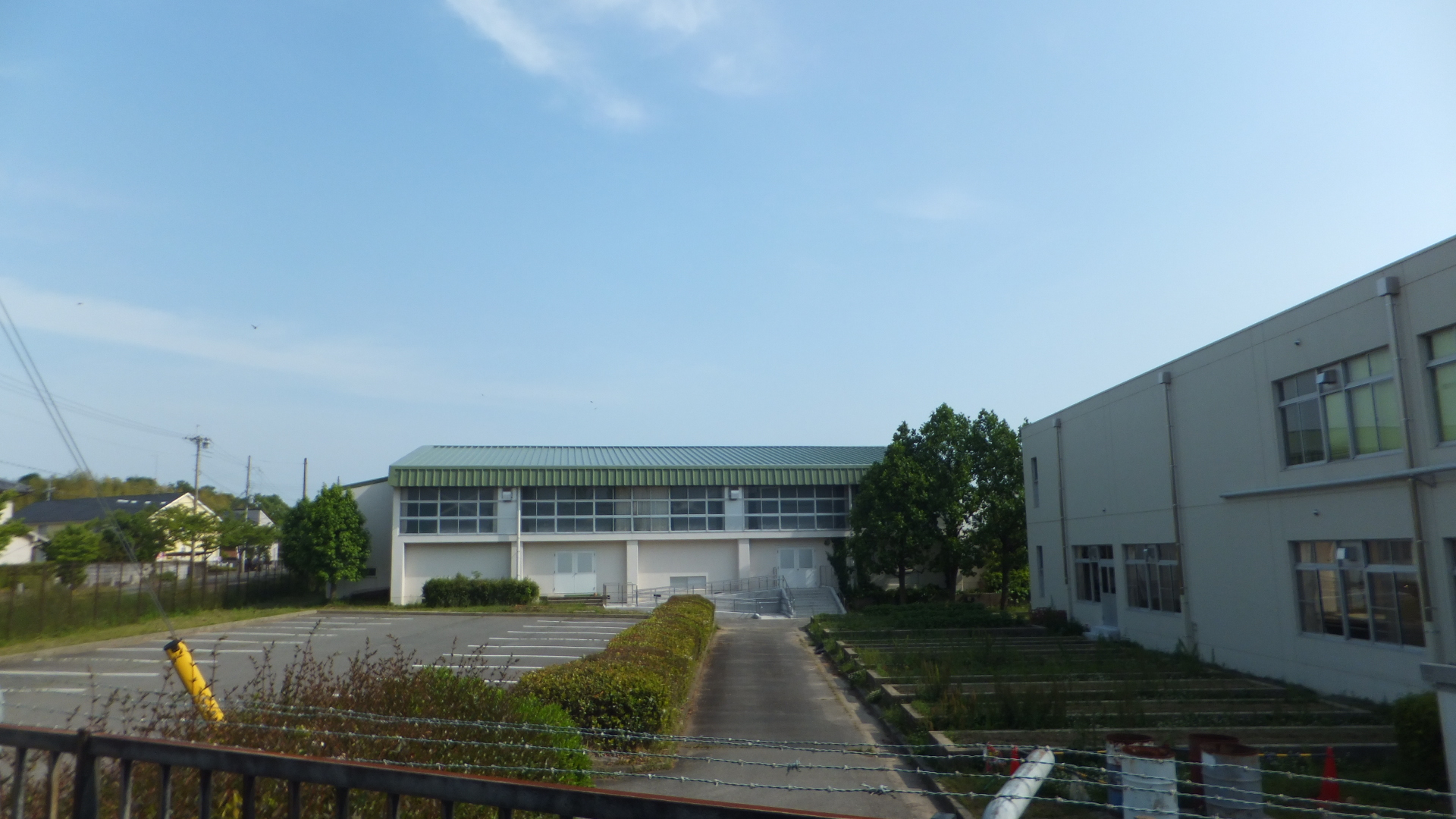 兵庫教育大学付属小学校